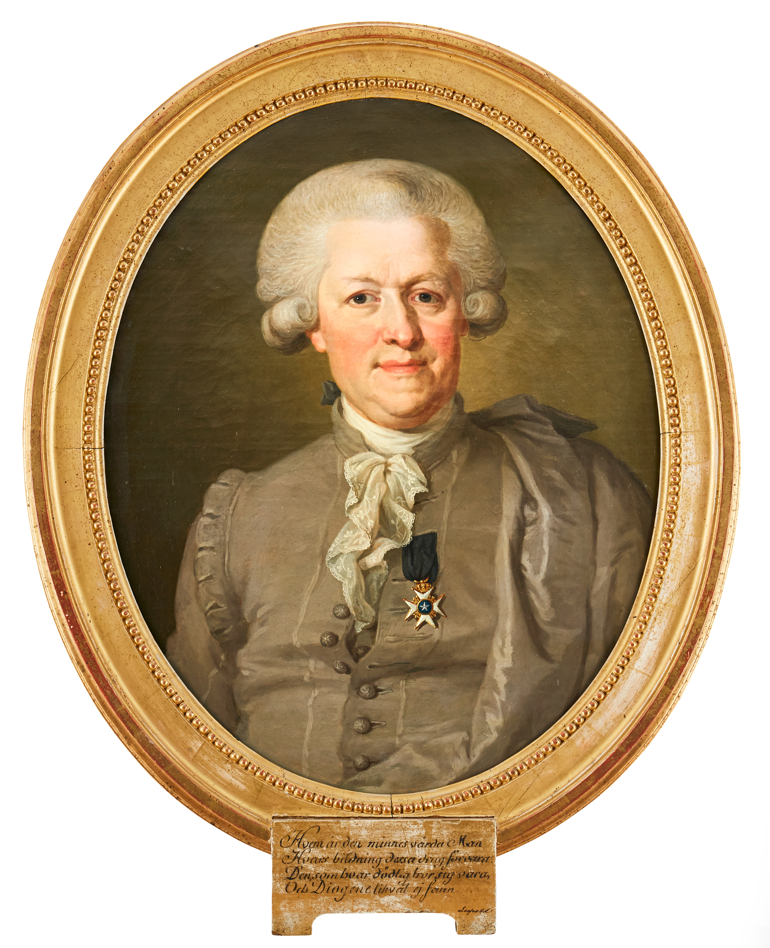 Porträtt föreställande Landshövding Nils von Rosenstein iklädd Nationella Dräkten samt med Nordstjärneordens riddartecken på bröstet. Registrerad i Svenska Porträttarkivet, SPA 1918:230.